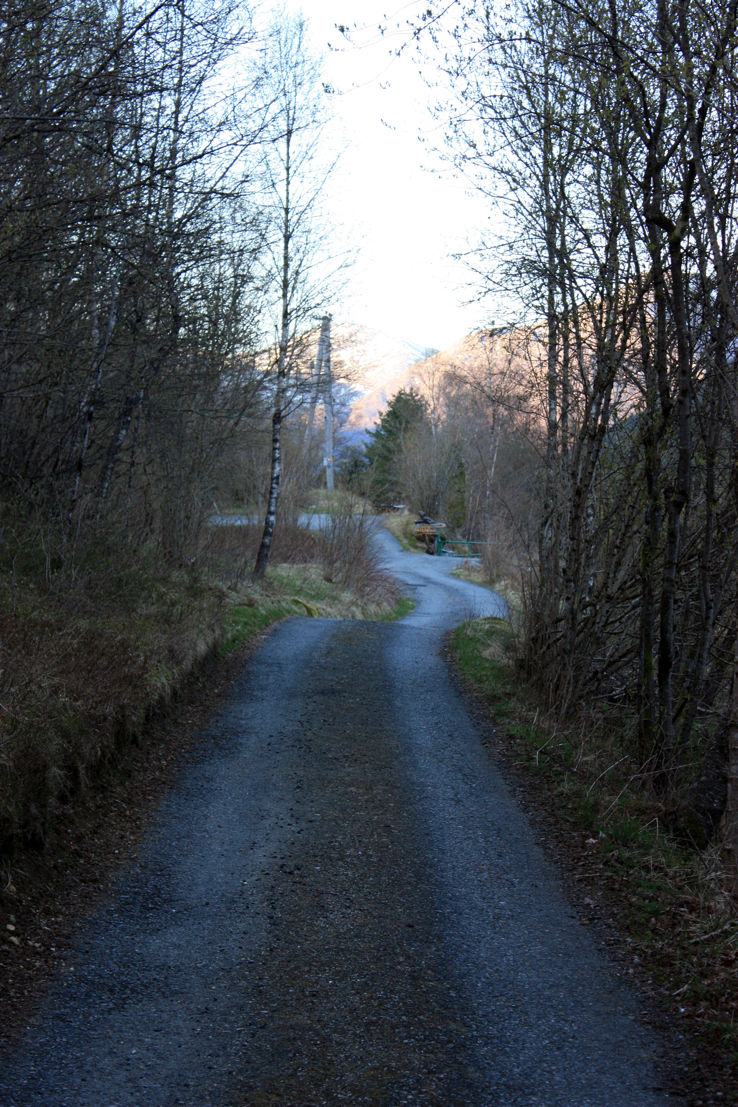 Engevikvegen, Fana, Bergen, Norway